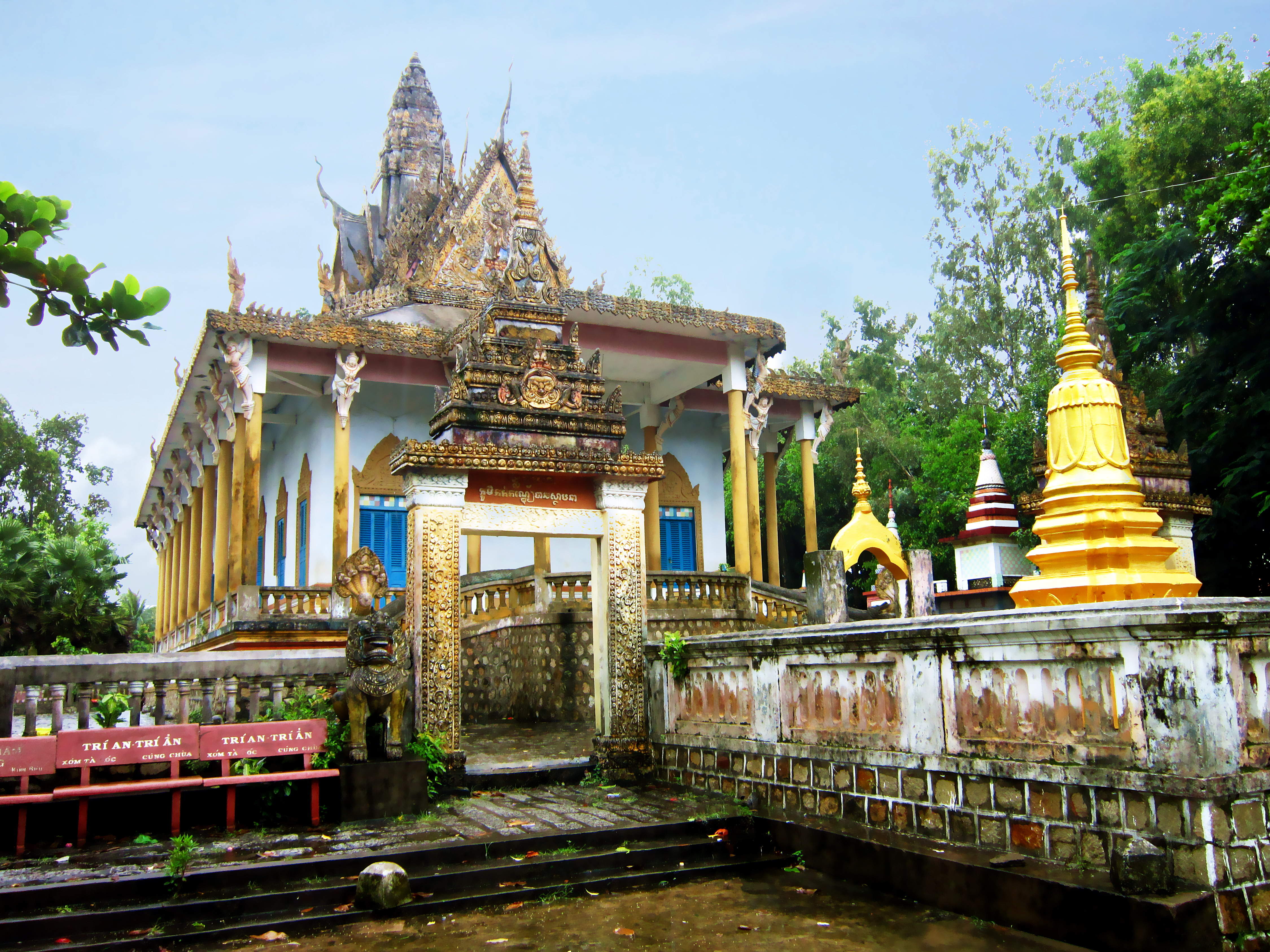 Chùa Sóc Xoài (Pháp hiệu: RAØJAKUSALA -PAÖBEÓJAEY XOAØY) ở khu phố Sơn Tiến, thị trấn Sóc Sơn, huyện Hòn Đất, tỉnh Kiên Giang, Việt Nam. Đây là một ngôi chùa của người Khmer, được thành lập cuối thế kỷ 18 tại Phum Kandal (xóm giữa, chỗ ngã ba kênh Tà Lúa), đến năm1884 di dời đến chổ hiện nay, và sau đó được trùng tu vài lần …Nguồn